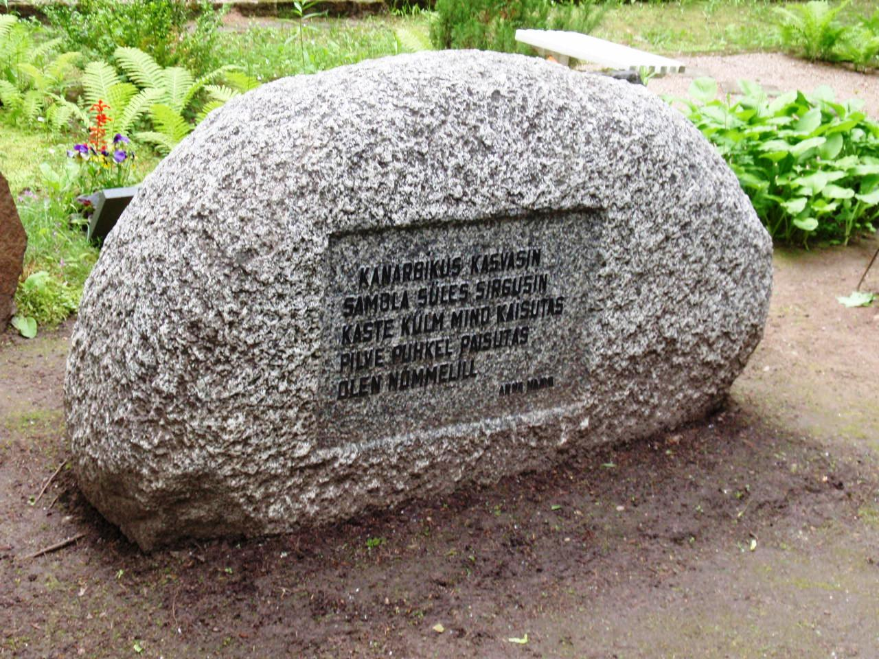 Anna Haava (1864-1957) haud